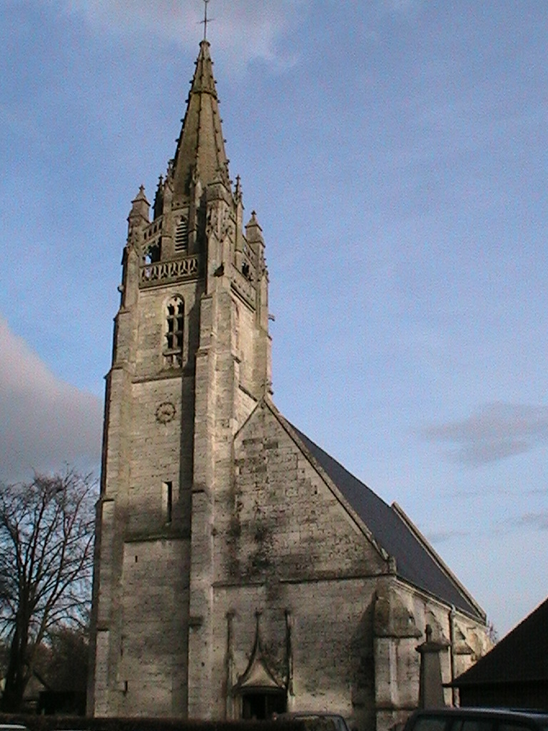 Intérieur de l'église Saint-Maurice d'Etelan